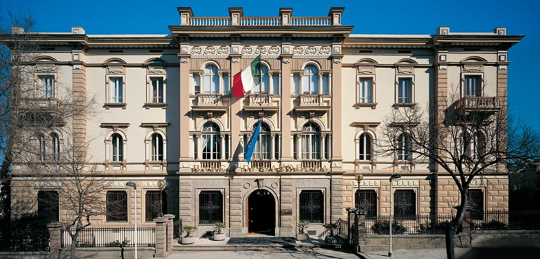 Sede amministrativa e Direzione Generale Banco di Sardegna - Sassari